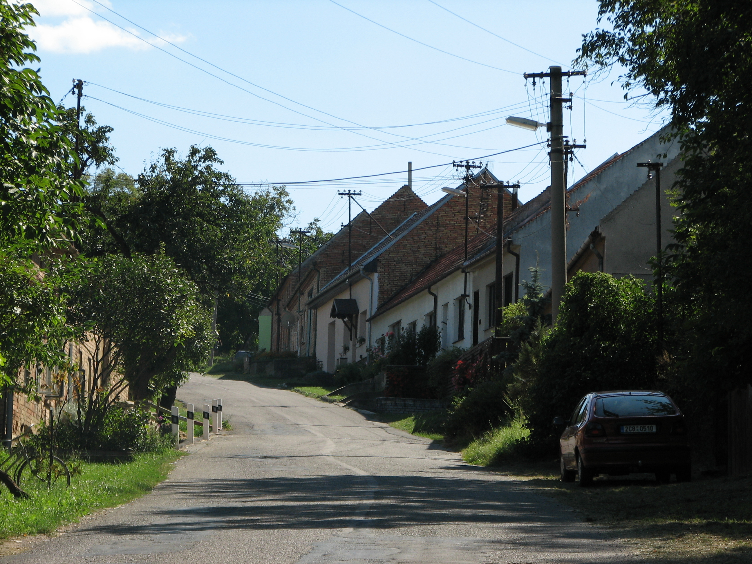 Česky: Nenkovice - ulice